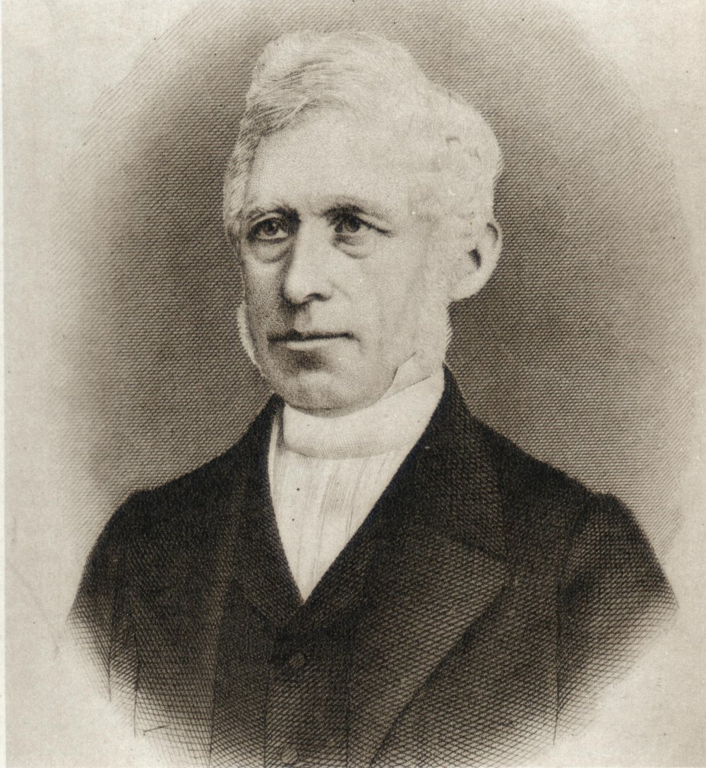 Christian Wilhelm Kyhl Gleerup (1800-1871), bokhandlare och förläggare. Stålstick av A. Weger efter ett foto.